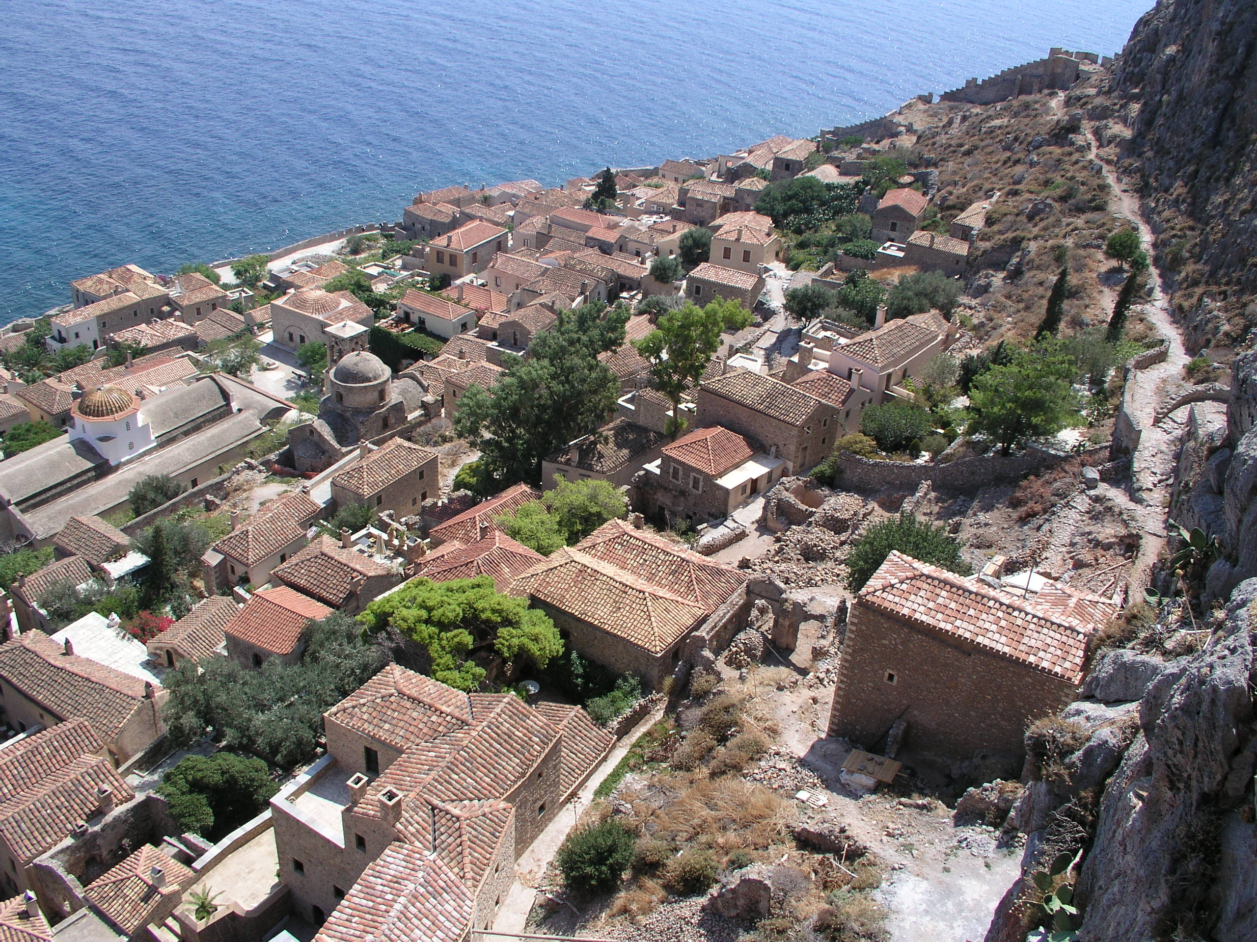 Monemvasia Ansicht von oben